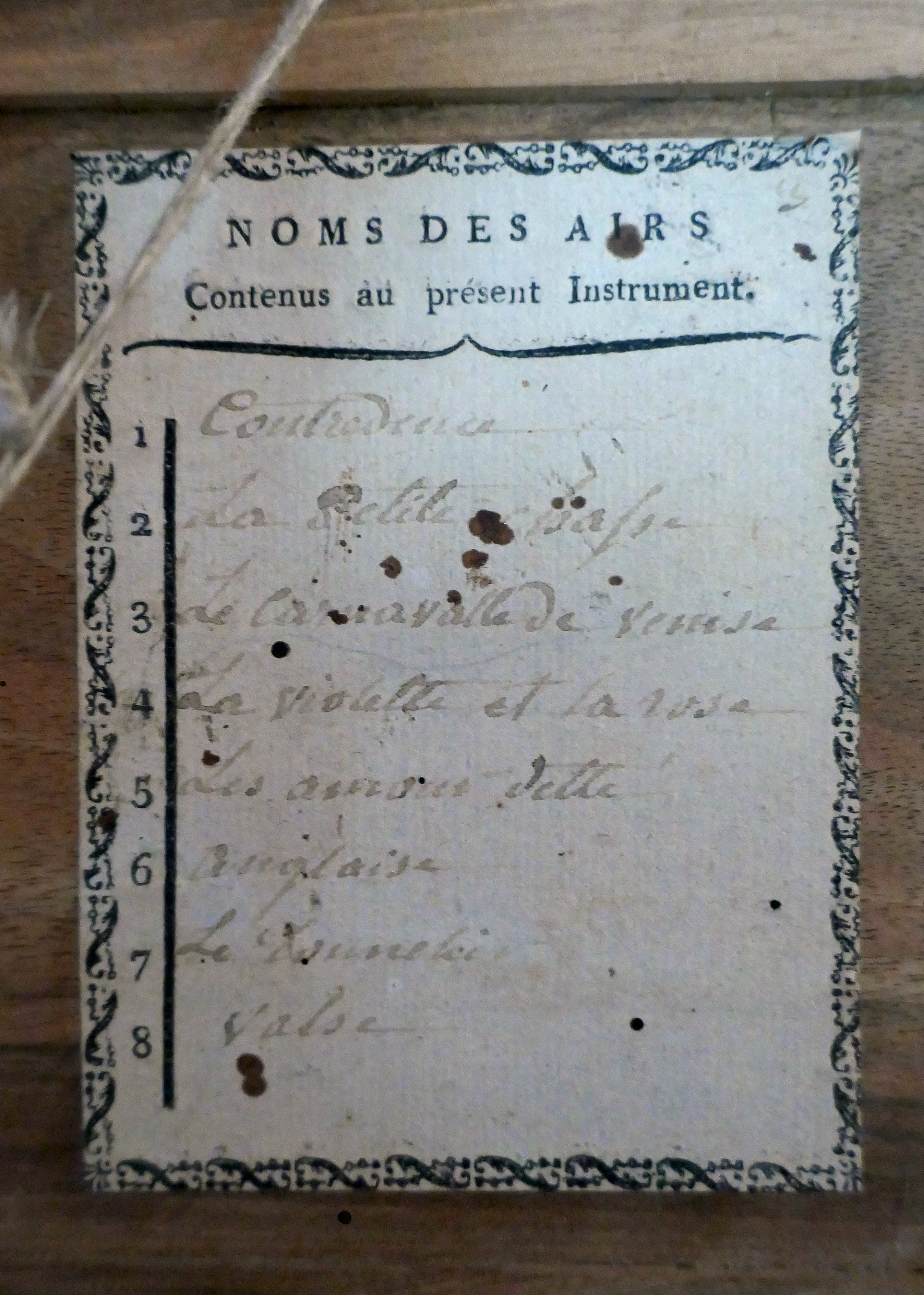 Lste des airs de la serinette de Jacotel Jacotel Châtenois, début du XIXe siècle 10 tuyaux Maison de la musique mécanique à Mirecourt